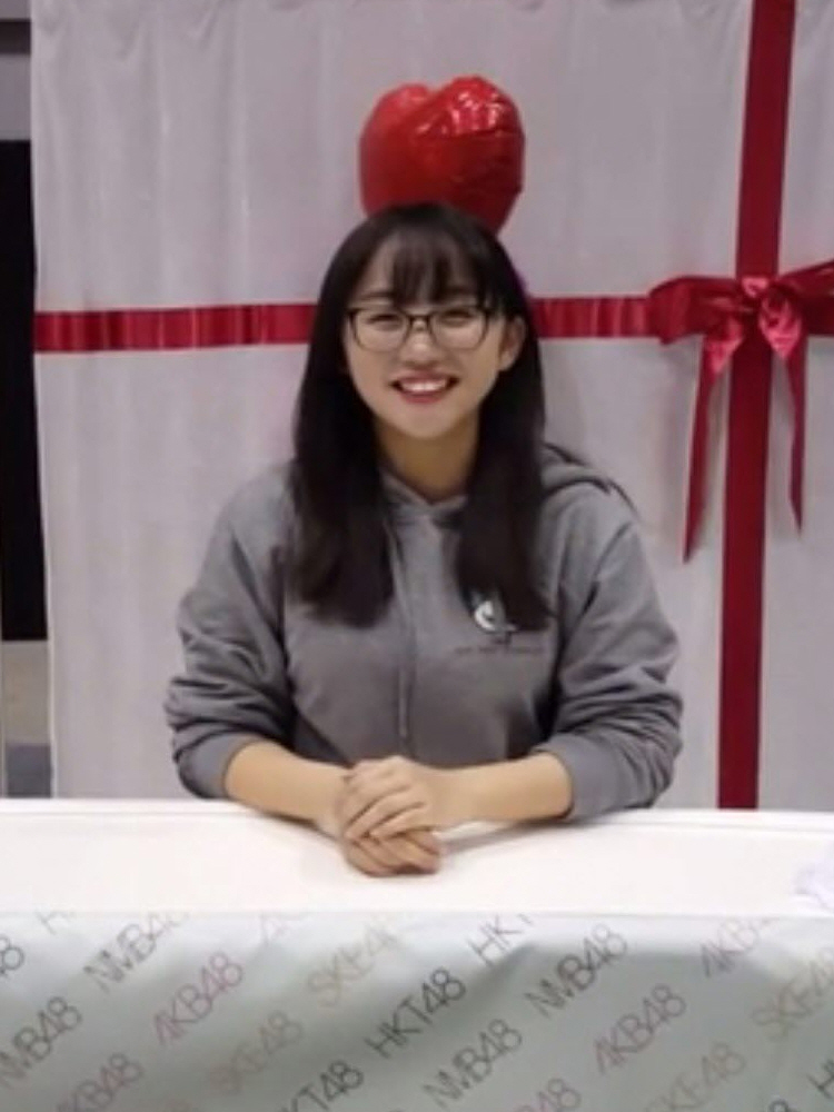 170204 AKB48 하이텐션 파시피코 요코하마 악수회 후기